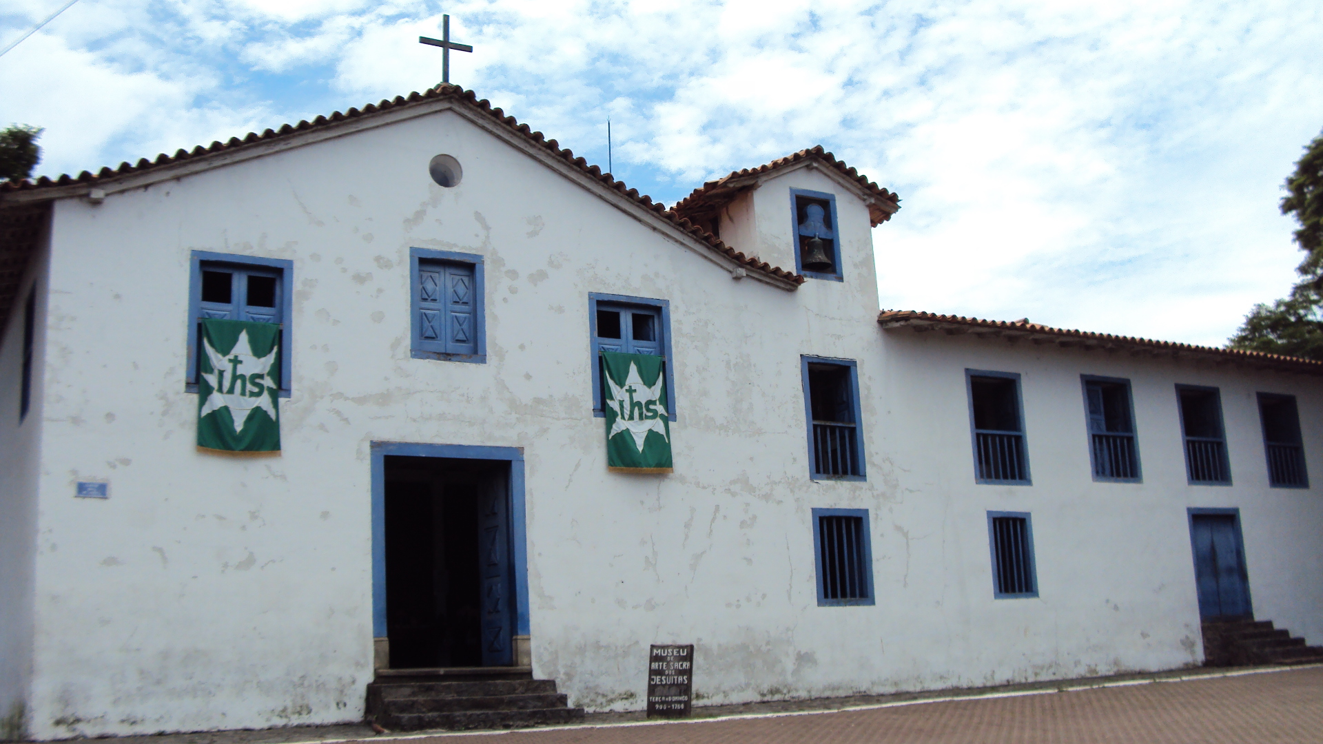 Igreja Nossa Senhora do Rosário